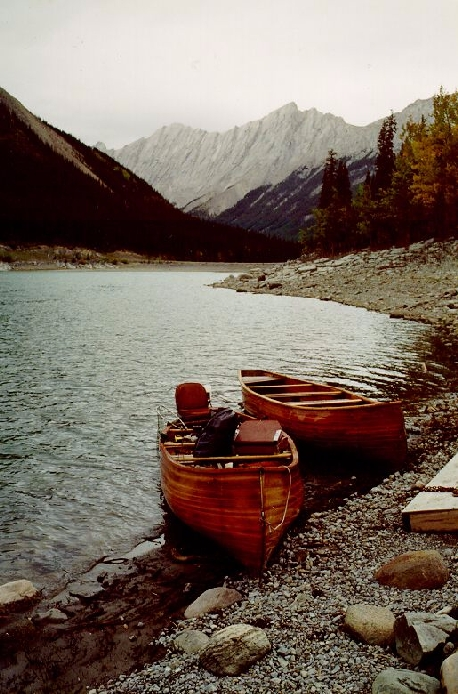 Medicine Lake, Jasper National Park, Alberta, Canada. Photo prise vers 1991 (Septembre). Picture shows two hand-made cedar strip freighter canoes constructed by Lorne Currie of Jasper, Alberta on the shore of Medicine Lake.